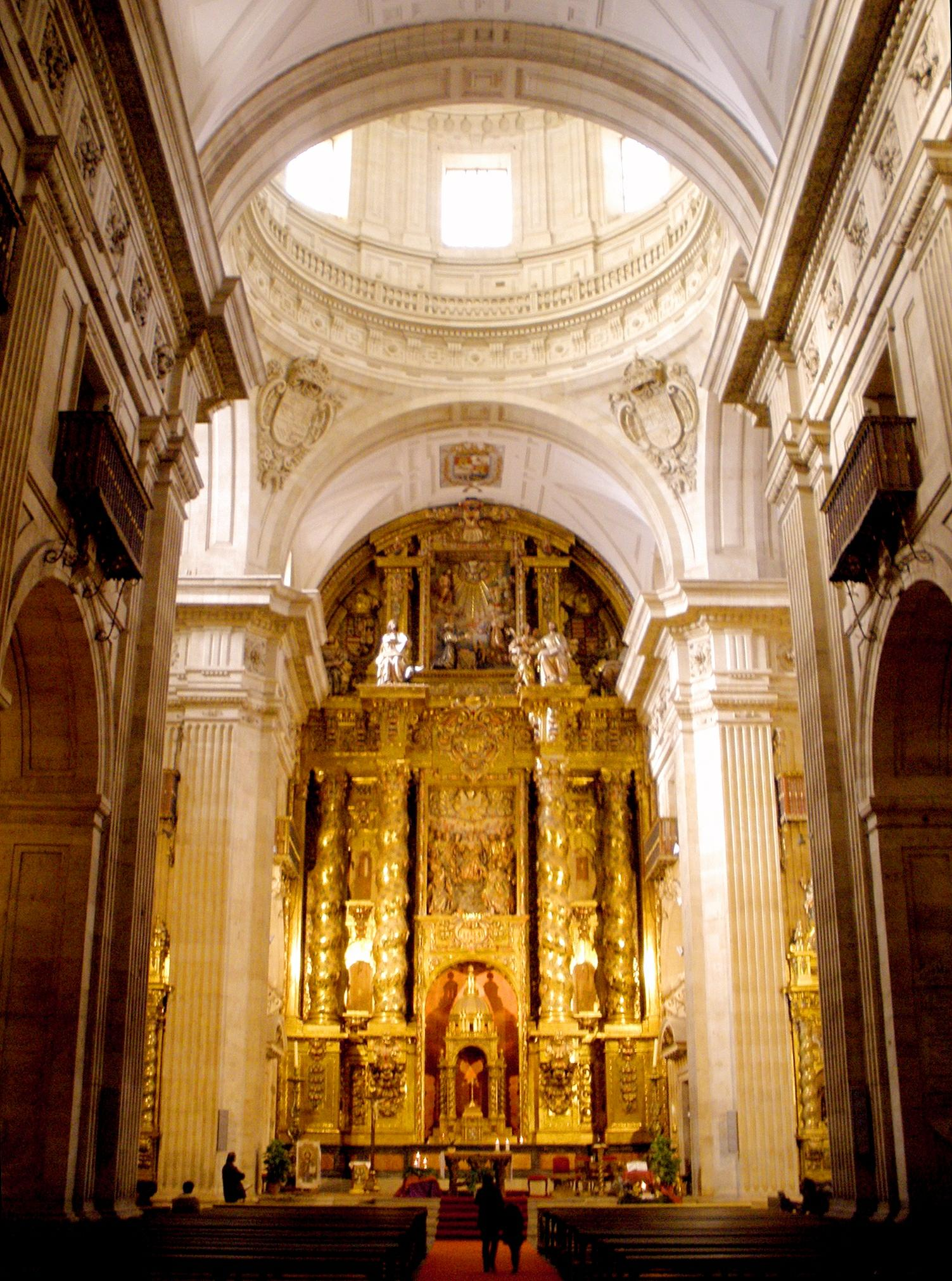 Nave principal y cabecera de la Clerecía de Salamanca (Castilla y León, España)